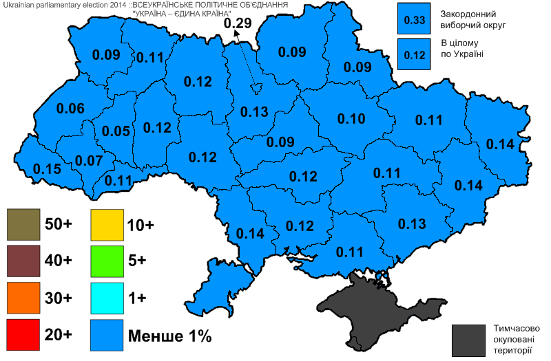 Результати виборів до Верховної Ради України, які відбулись 25 жовтня 2014 року. Інформація з офіційного сайту ЦВК. Політична партія Всеукраїнське об’єднання "Свобода".